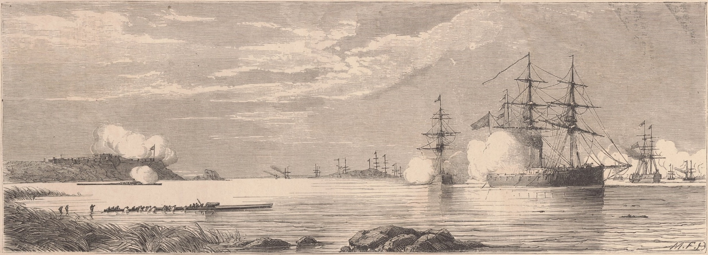 La flotte brésilienne est attaquée par une chata paraguayenne, qui tue 34 personnes à bord du Tamandaré (D'après les croquis de M. C. E.).